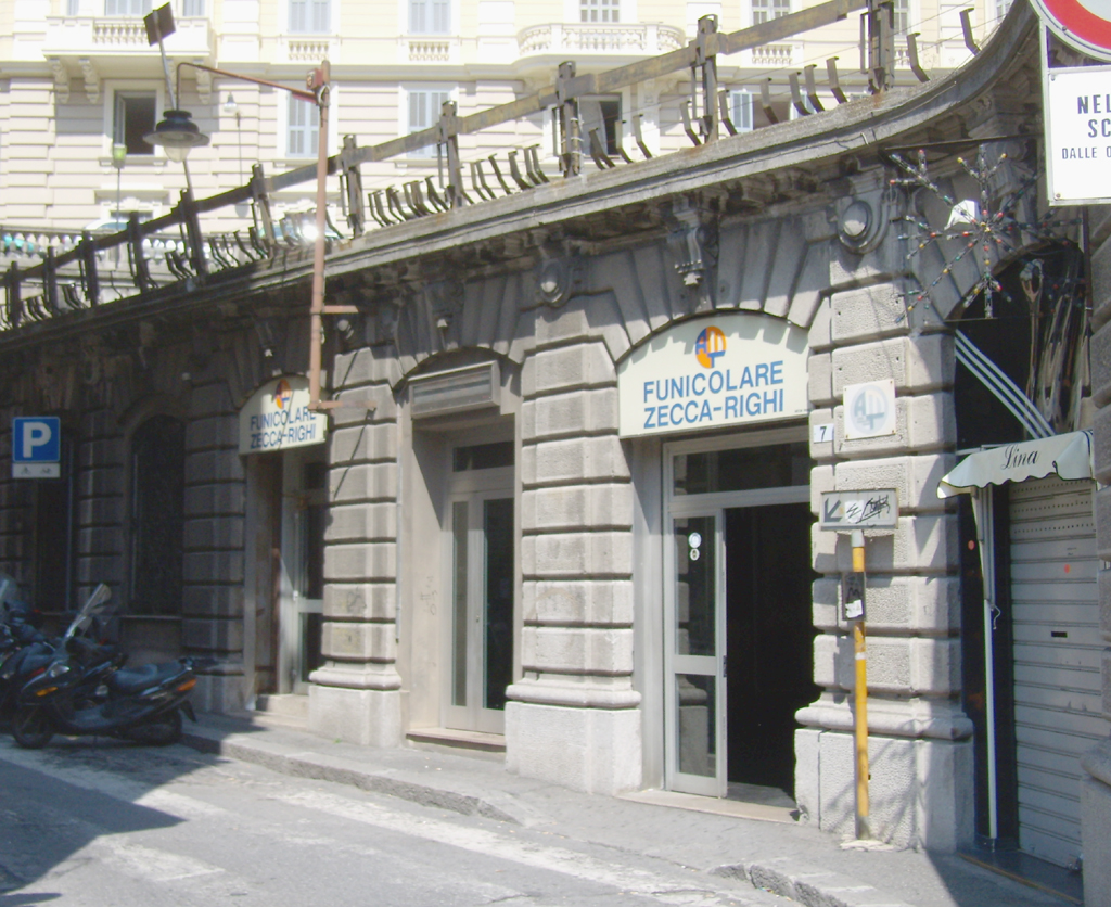 Funicolare Zecca-Righi a Genova, la stazione inferiore in largo della Zecca.